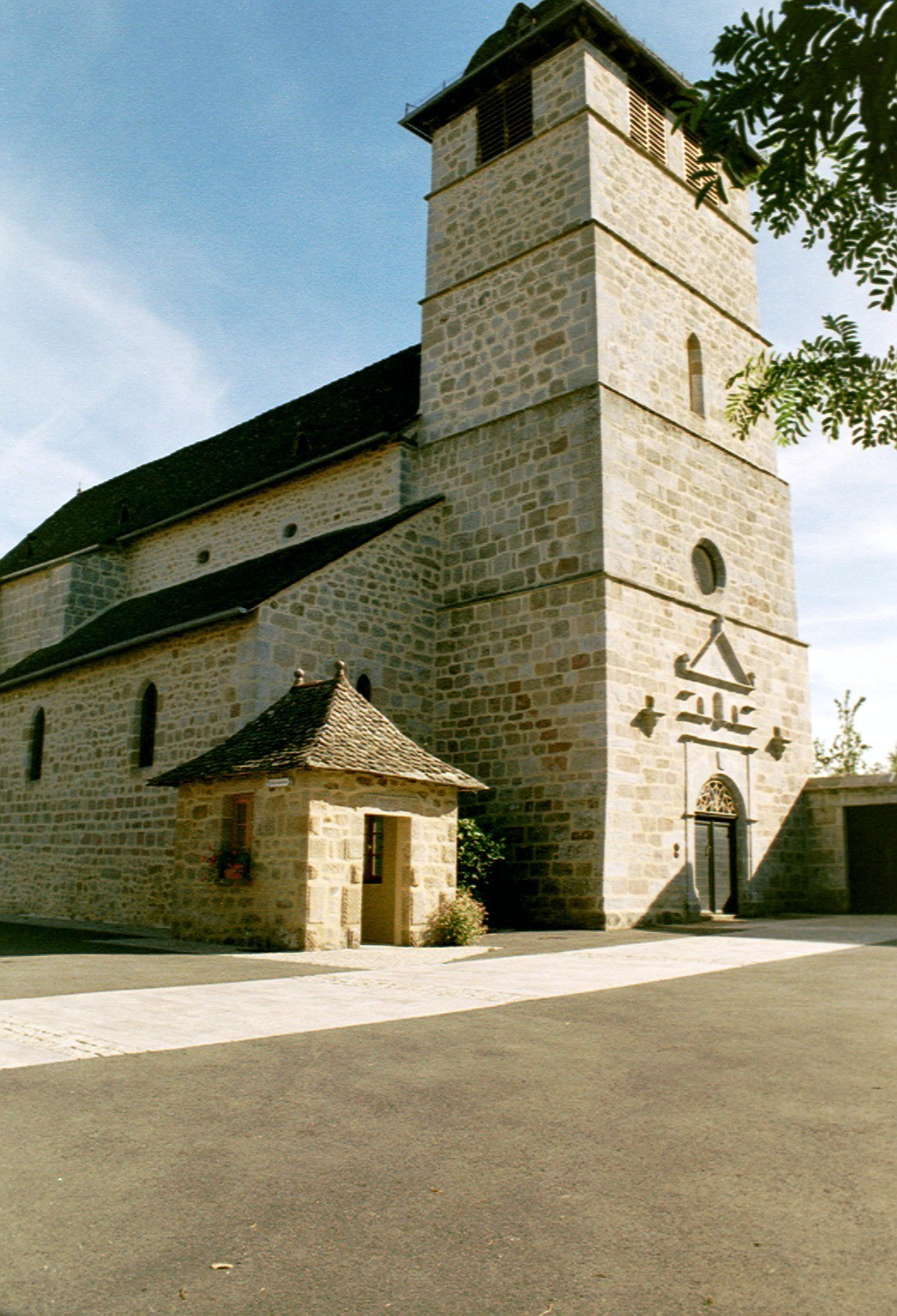 Gerestaureerde kerk Rouffiac